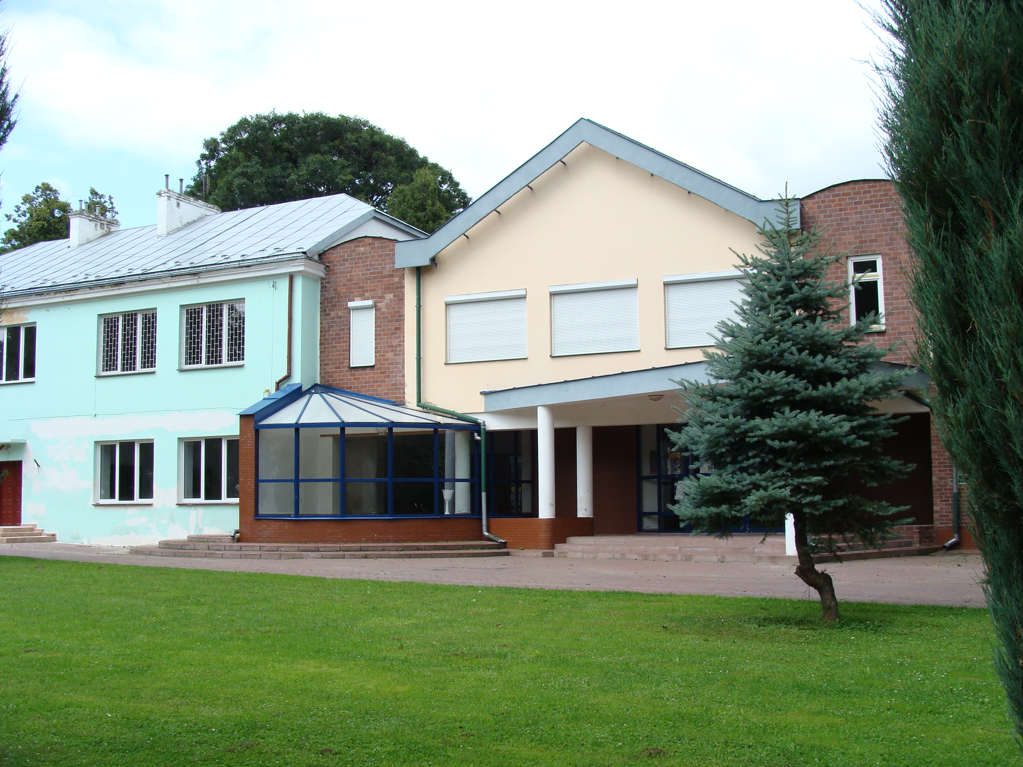 Nowe budynki zespołu szkół